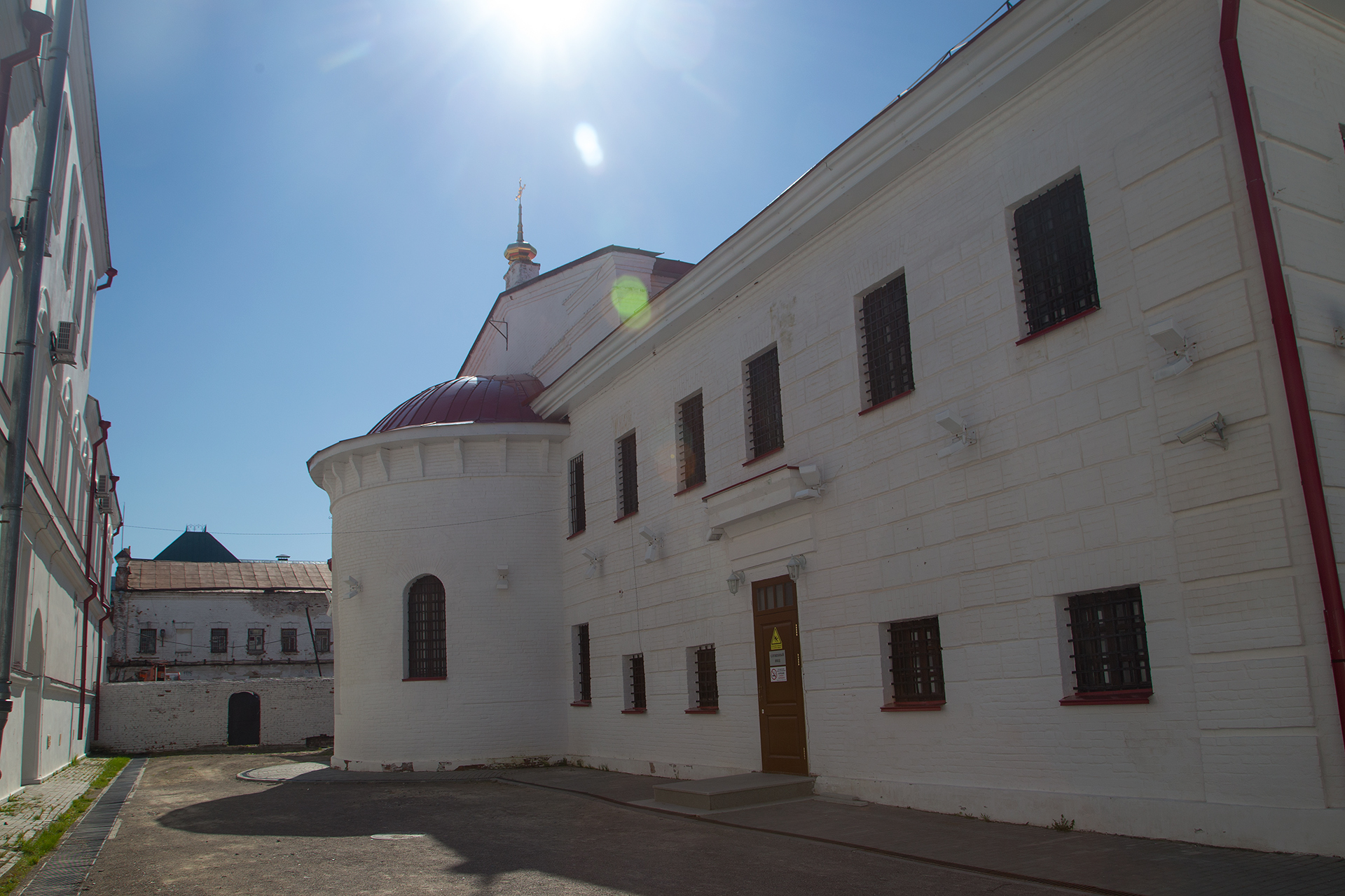 Арестантский корпус №1 с церковью Александра Невского: площадь Красная, 4, Тобольск, Тюменская область